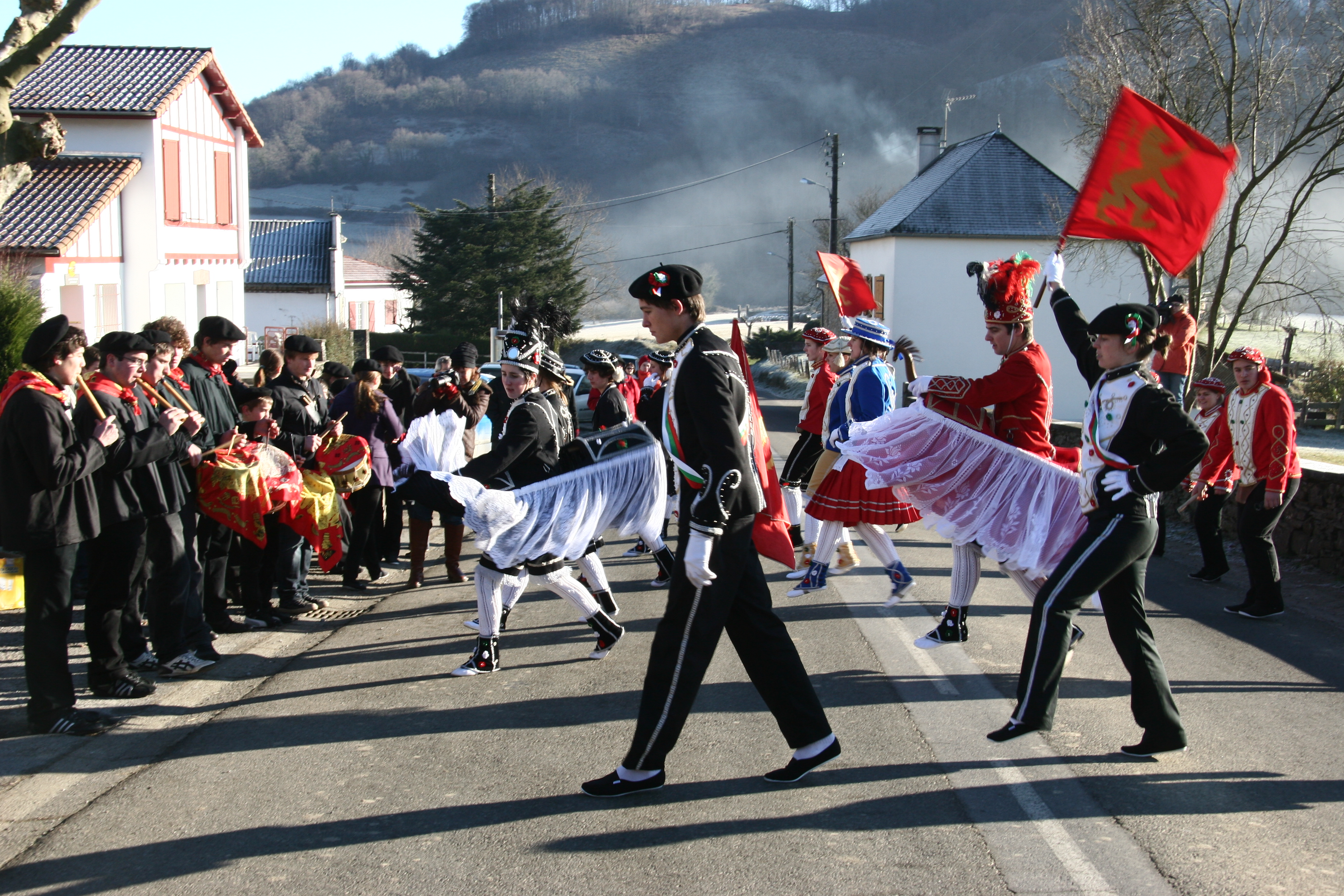 2009ko Masakaradak Barkoxen.